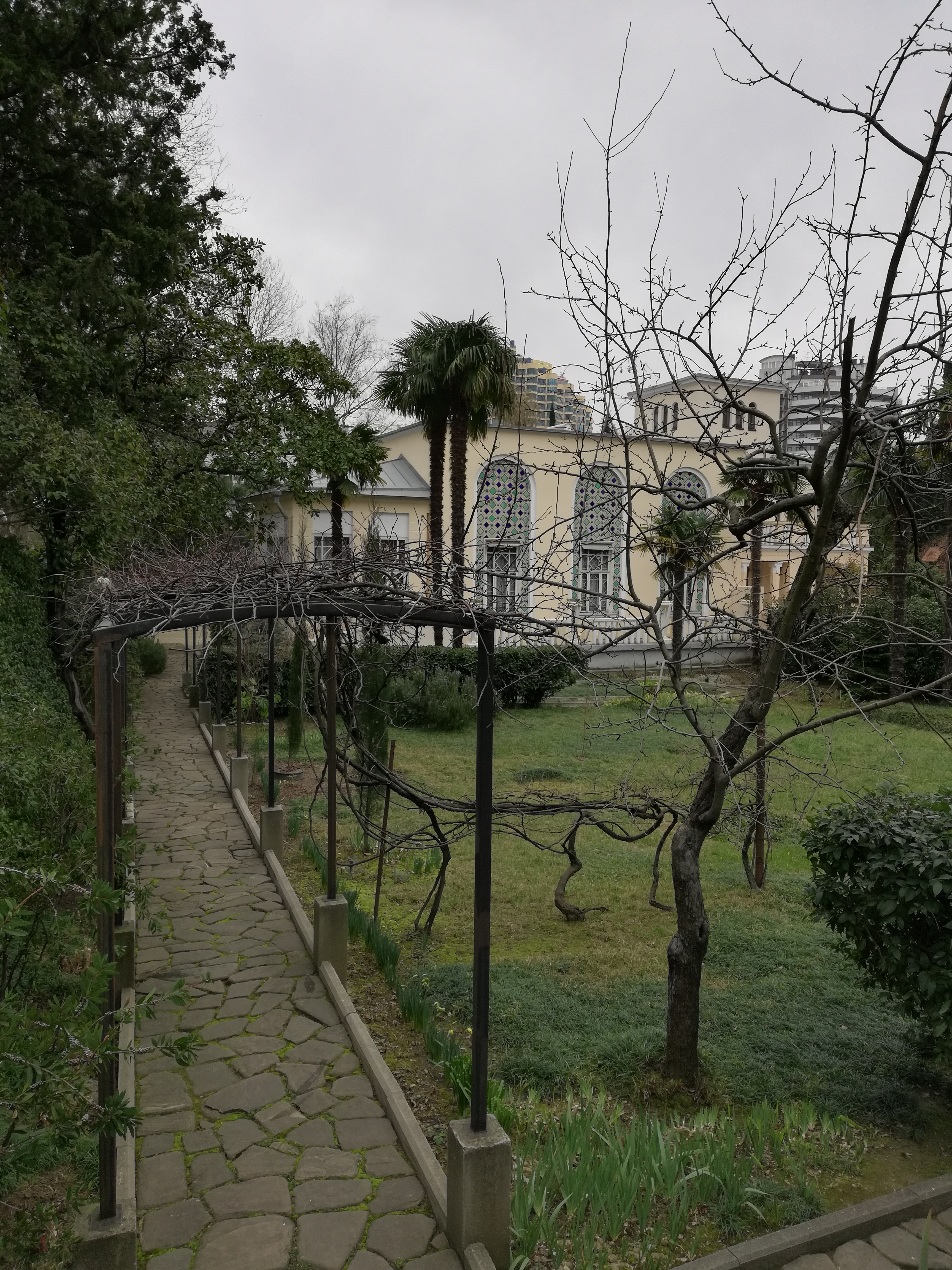 Дом, в котором жила Барсова В.В., народная артистка СССР: улица Черноморская, 8, Хостинский район, Сочи, Краснодарский край